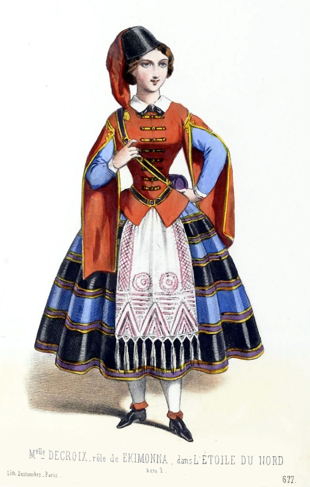 Melle Decroix, rôle de Ekimonna, dans L'étoile du nord, acte 2